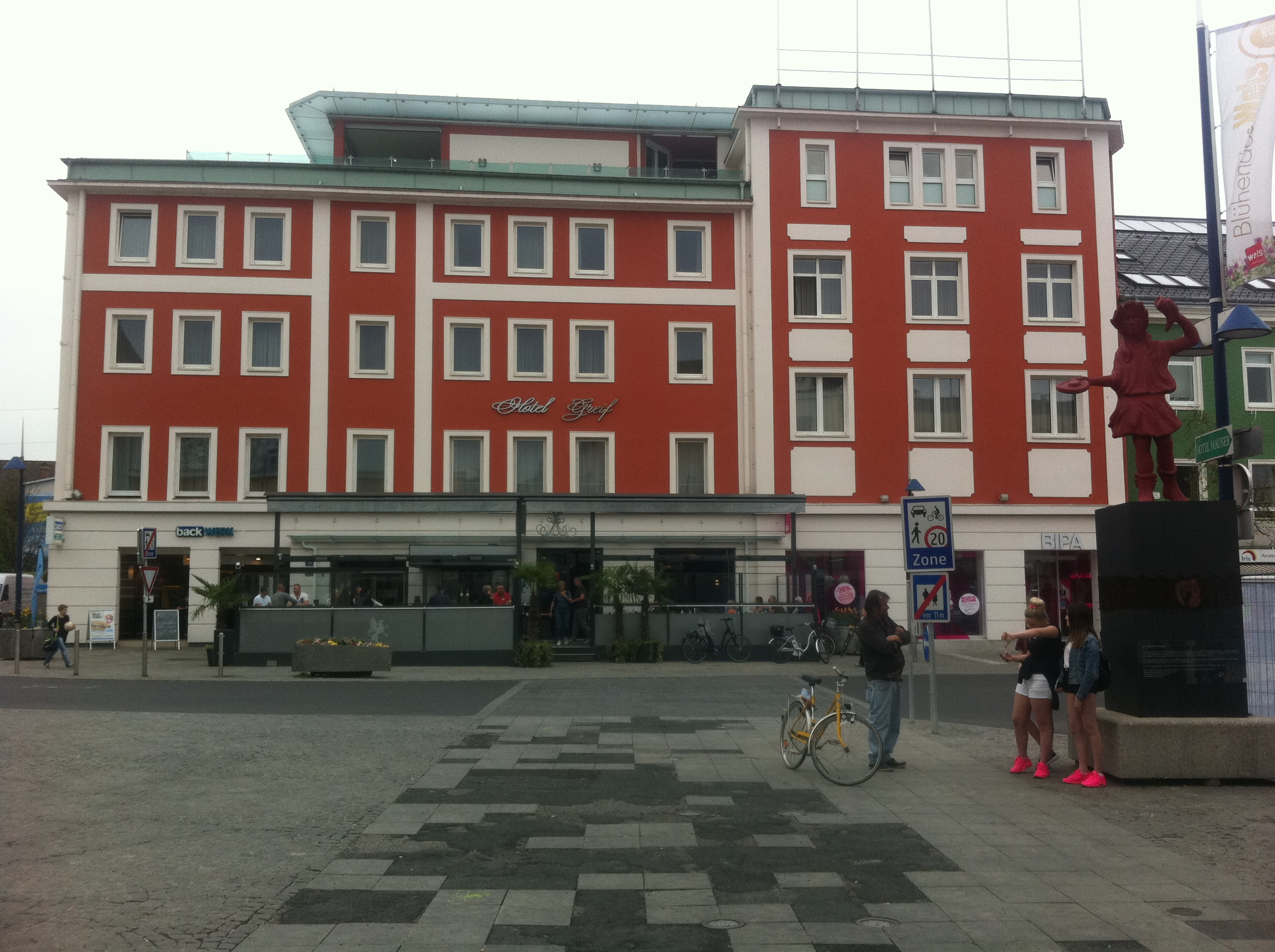 Stadttheater Hotel Greif vom Kaiser-Josef-Platz aus gesehen